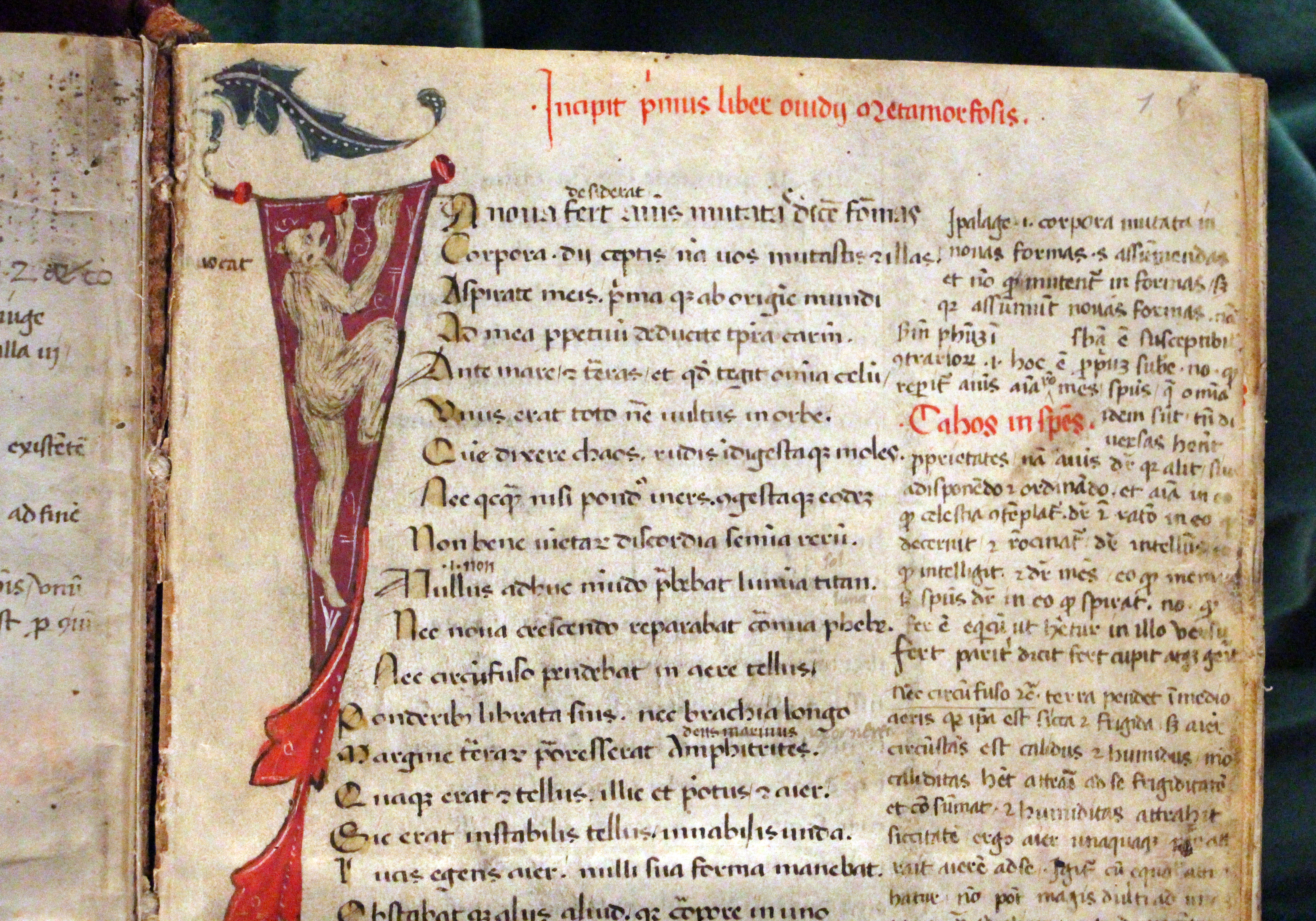 Biblioteca Medicea Laurenziana